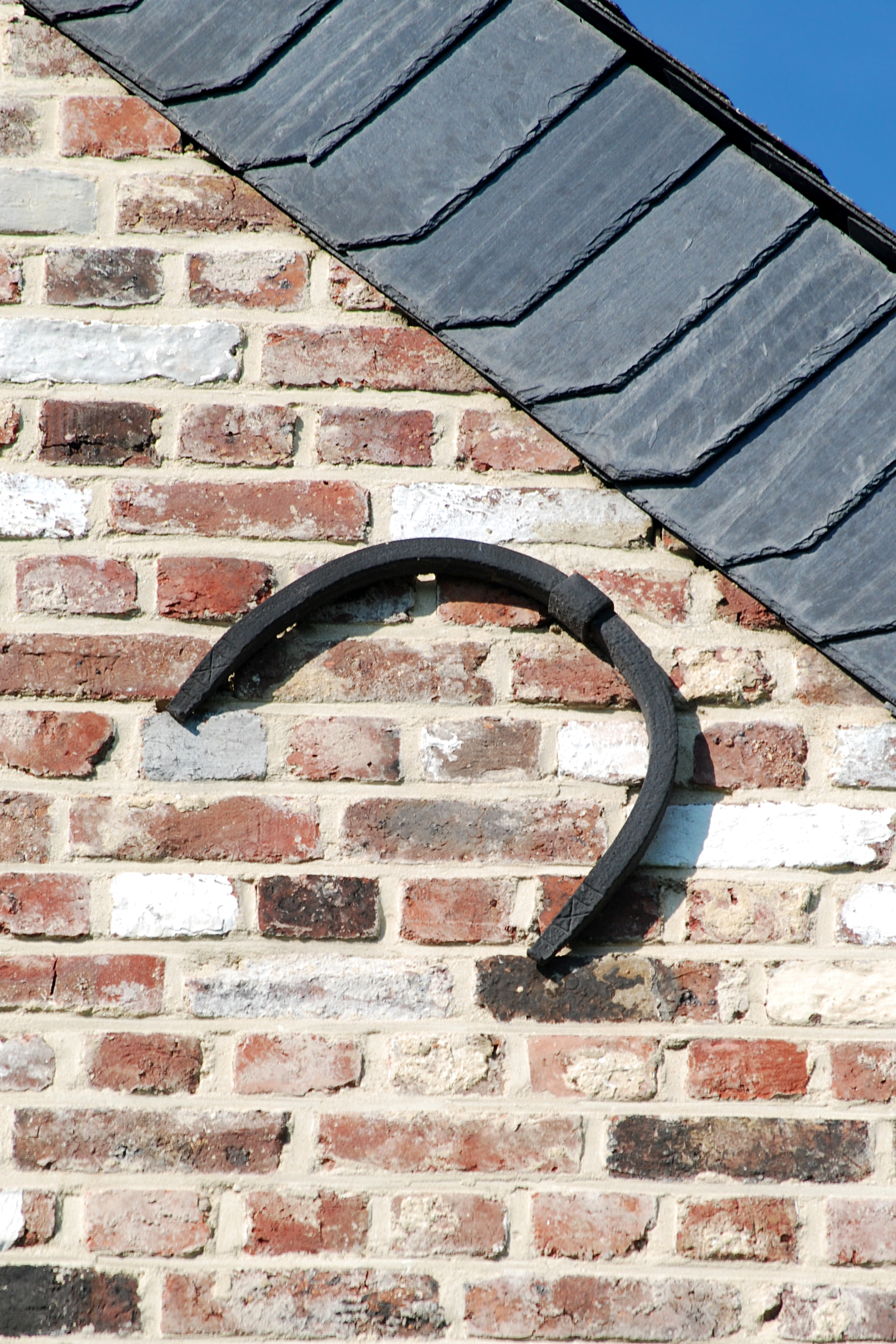 Belgique - Wallonie - Ottignies - Ferme du Douaire